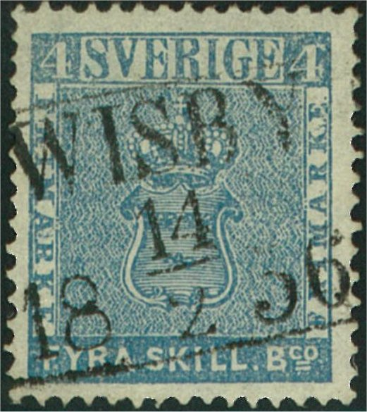 Sveriges första frimärken utgavs 1.7.1855 och var i valörerna skilling banco. Det gavs ut 5 olika valörer: 3, 4, 6, 8 och 24 skilling banco. Den vanligaste valören är 4 skilling banco som användes för frankering av vanliga inrikes brev under åren 1855-1858.